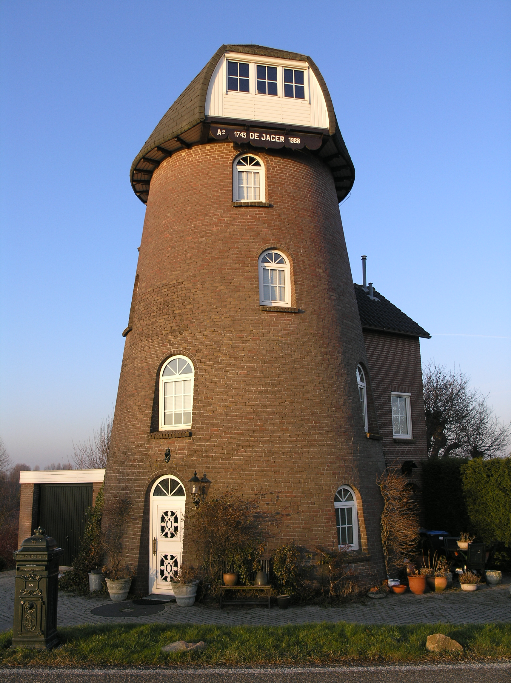 Herwijnen De Jager Molenwoning